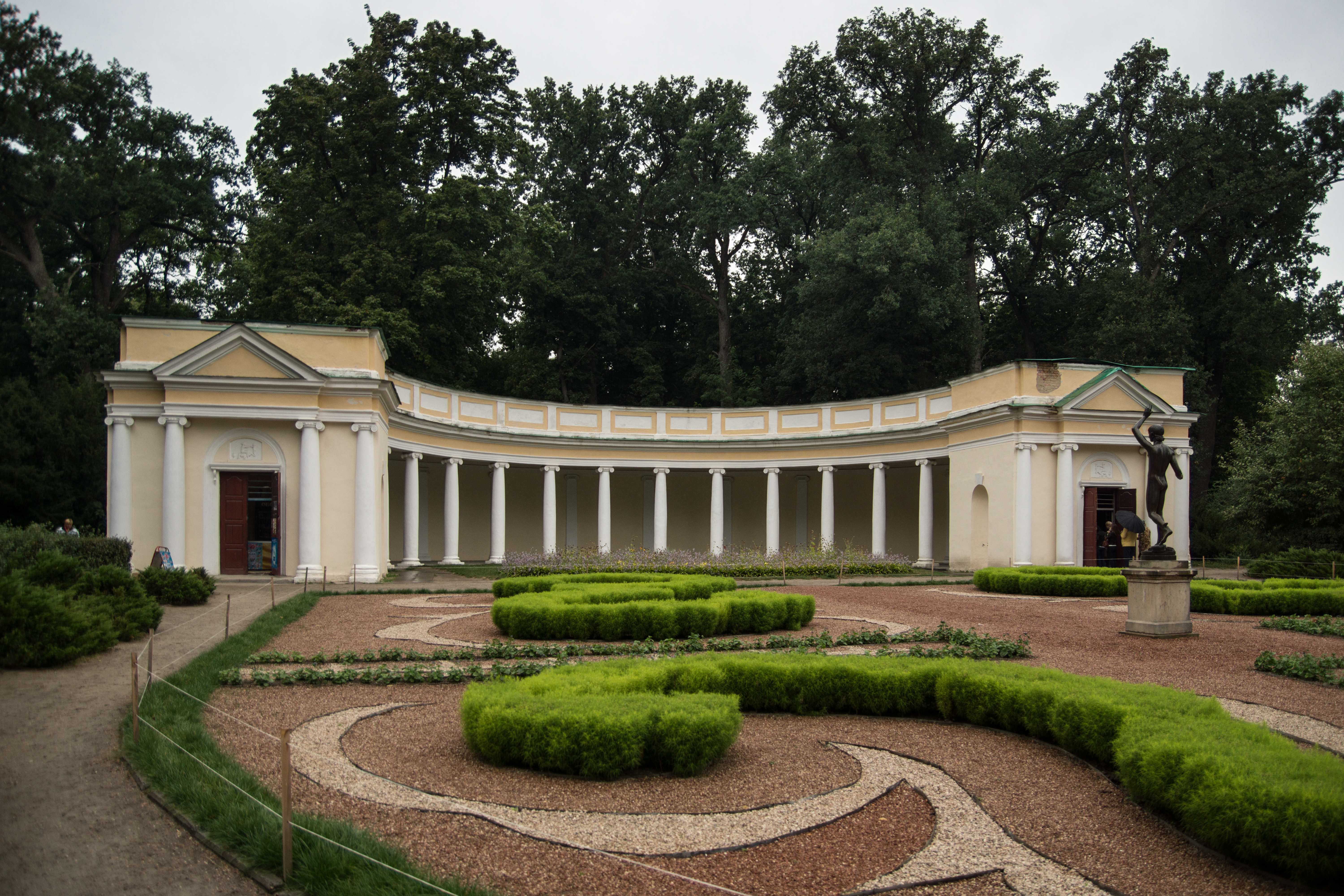 Parque Alejandría